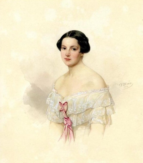 Анна Григорьевн Философова, ур. Столыпина (1815—1892)